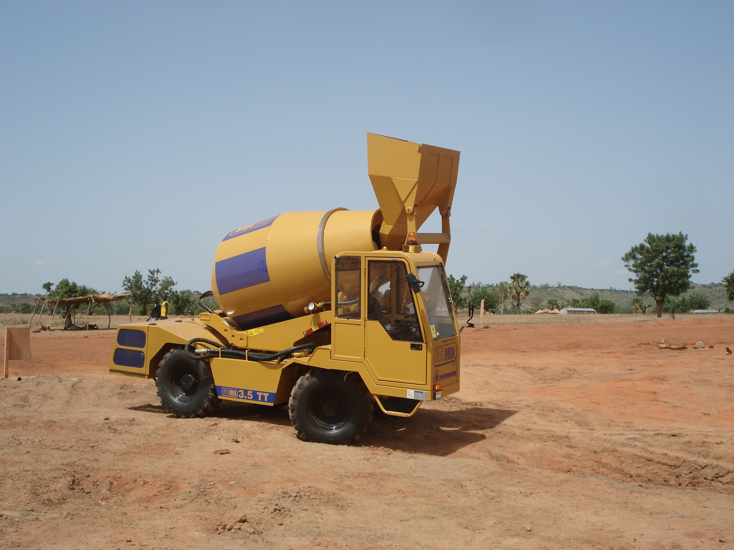 Cement mixer